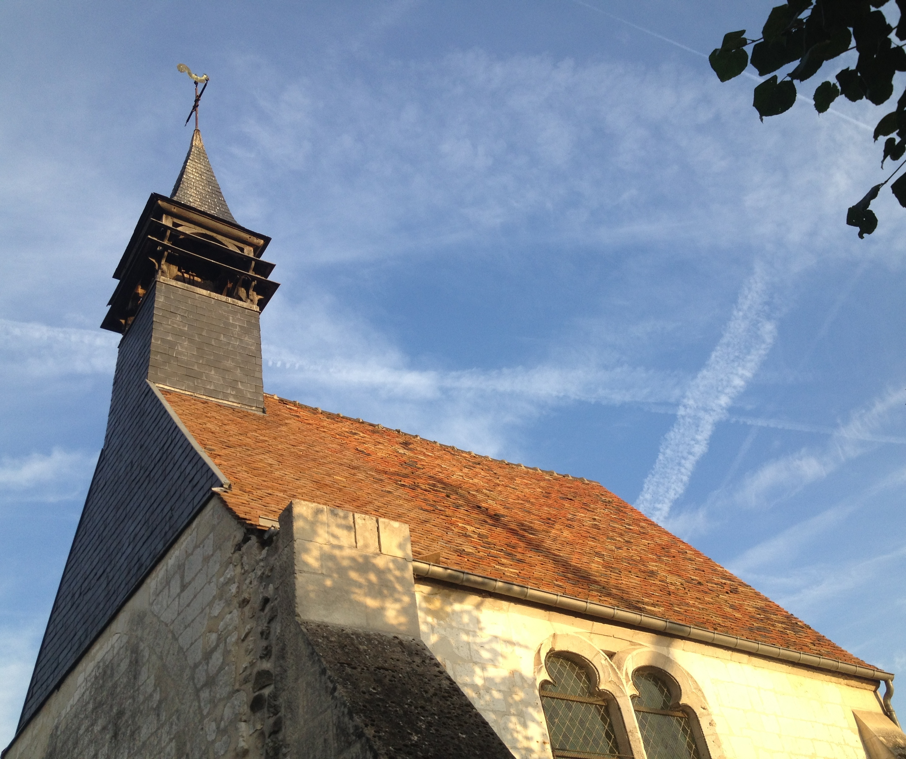 Chapelle de Bracheux.